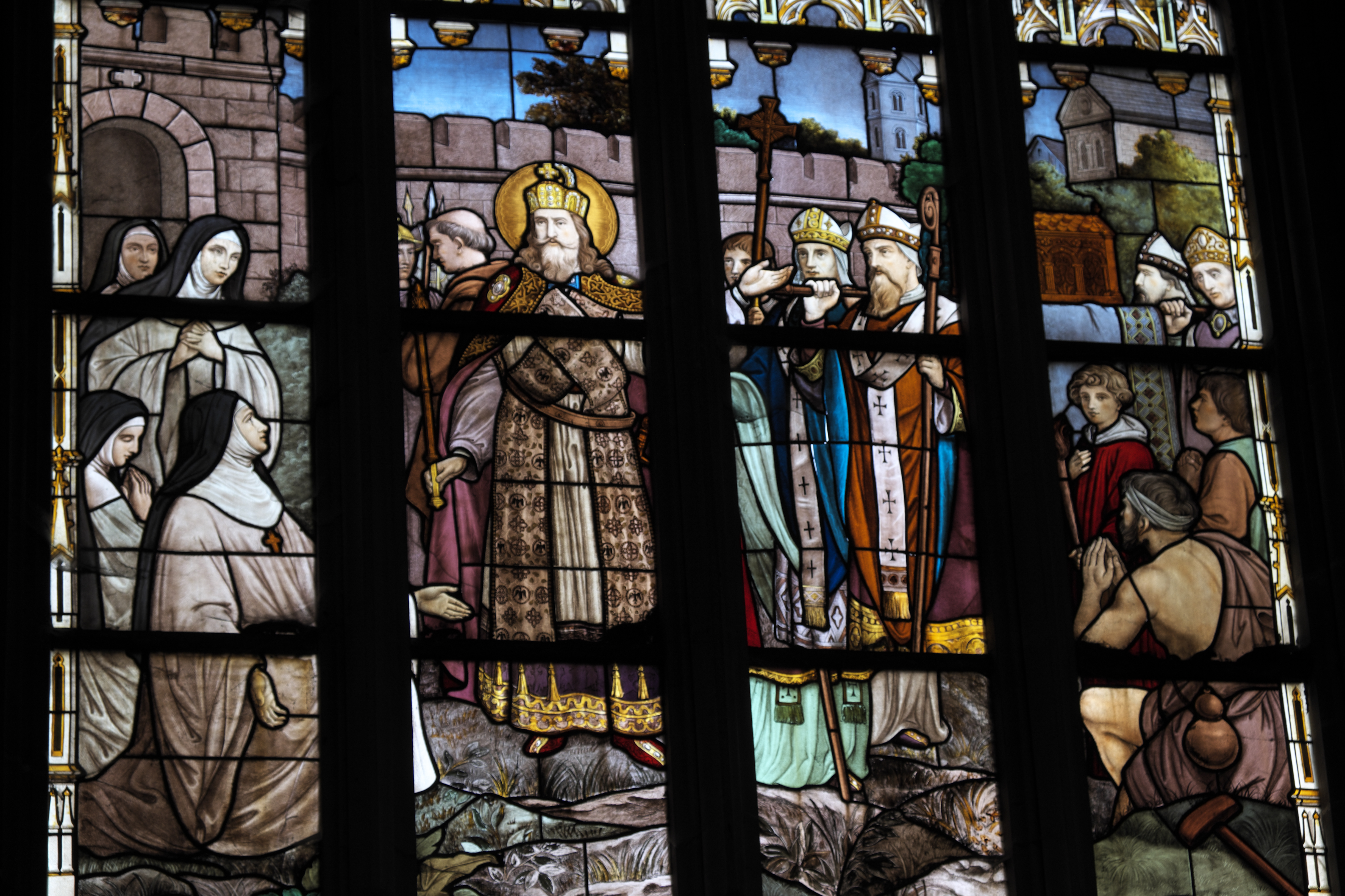 Katholische Pfarrkirche Saint-Jean-Baptiste (Johannes der Täufer) in Dammartin-en-Goële im Département Seine-et-Marne (Région Île-de-France/Frankreich), Bleiglasfenster mit der Jahreszahl 1913, Darstellung: Karl der Große übergibt seiner Tochter (fälschlich Nichte) Theodrada die heilige Tunika von Argenteuil